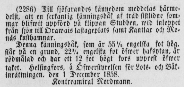 Klipp om den nya känningsbåken på Stubben 1858.